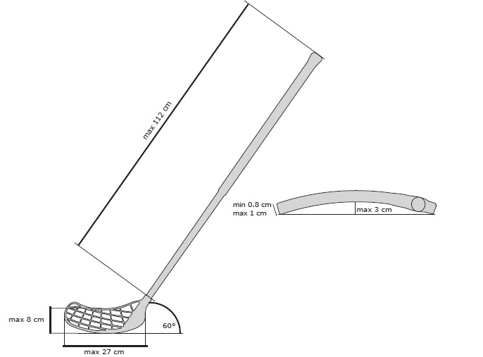 Mazza regolamentare di Wheelchair Hockey